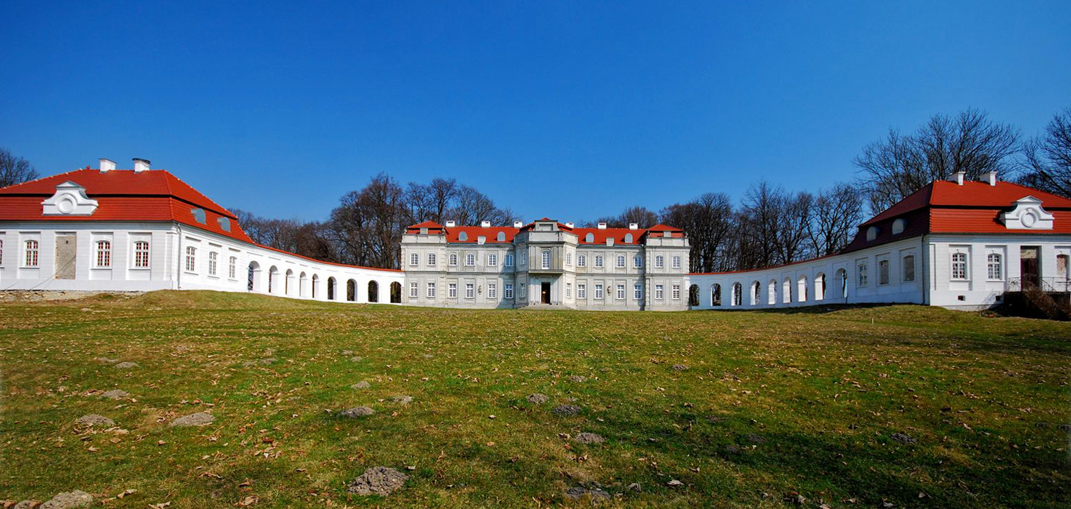 zespół pałacowy pałac pawilon I w zespole pałacowym pawilon II w zespole pałacowym kordegarda I w zespole pałacowym kordegarda II w zespole pałacowym brama w zespole pałacowym Narol, Narol